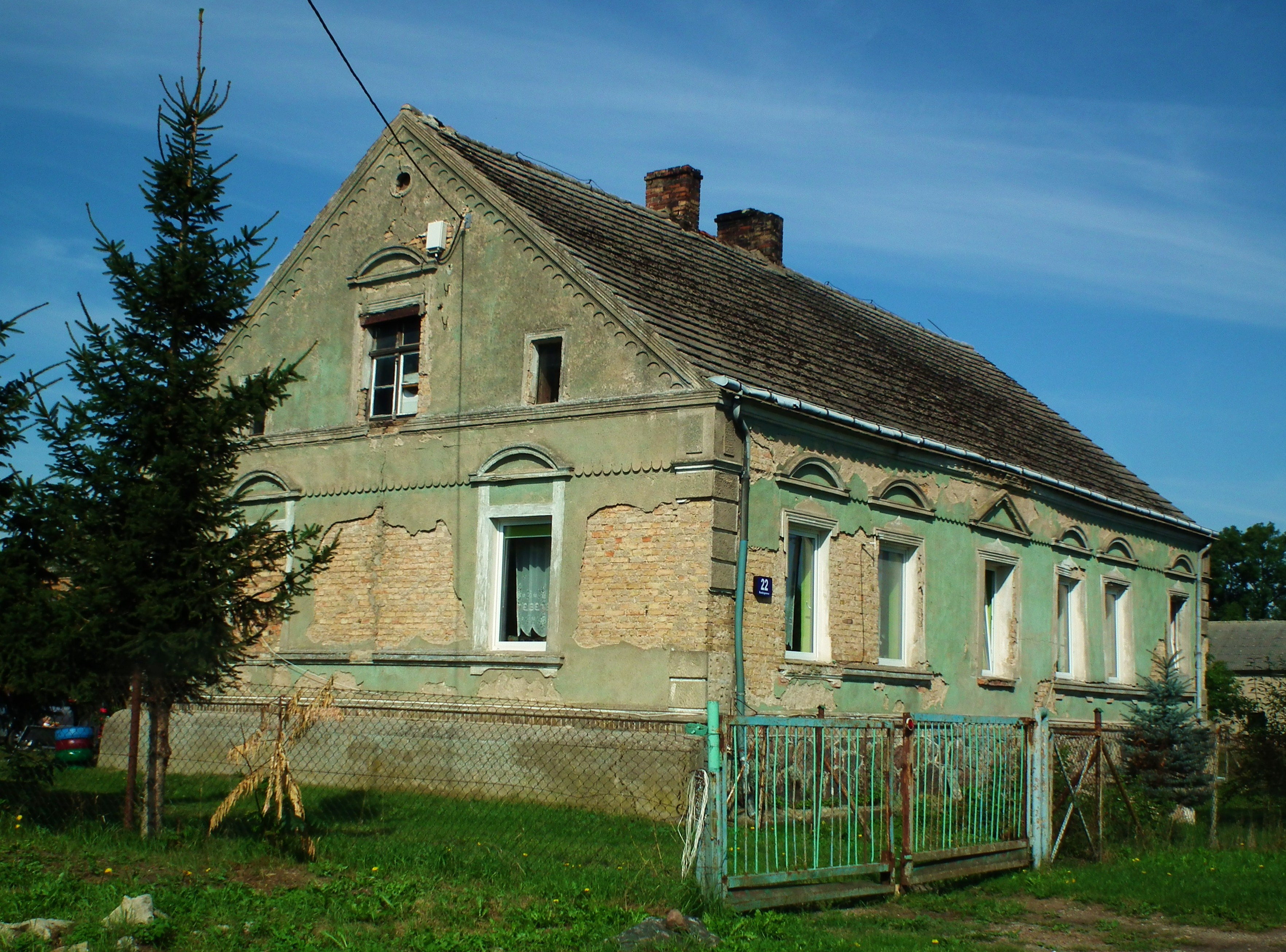 Wieś fryderycjańska Budzigniew na błotach warciańskich.